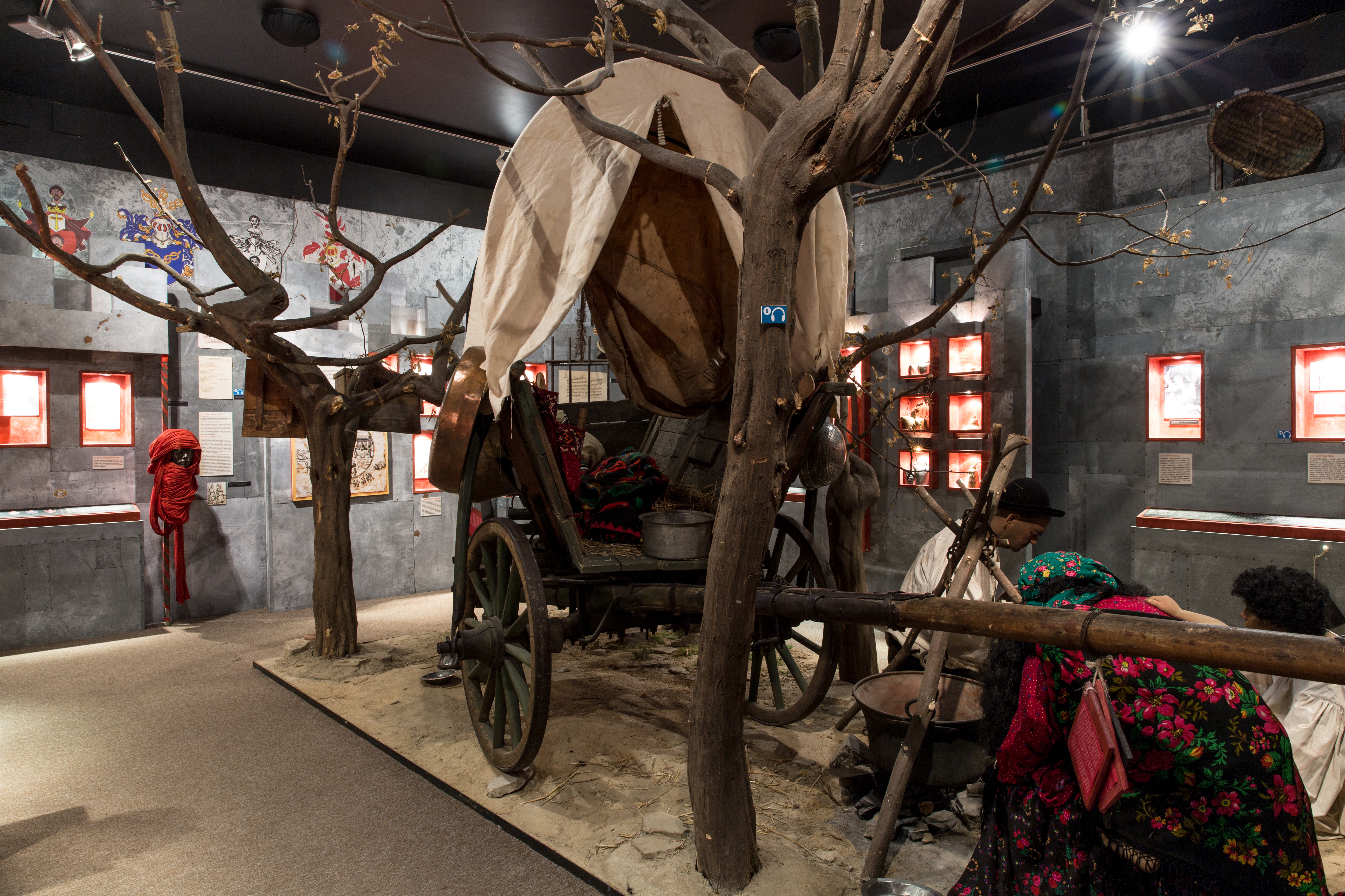 Pohled do stálé expozice Muzea romské kultury v Brně.